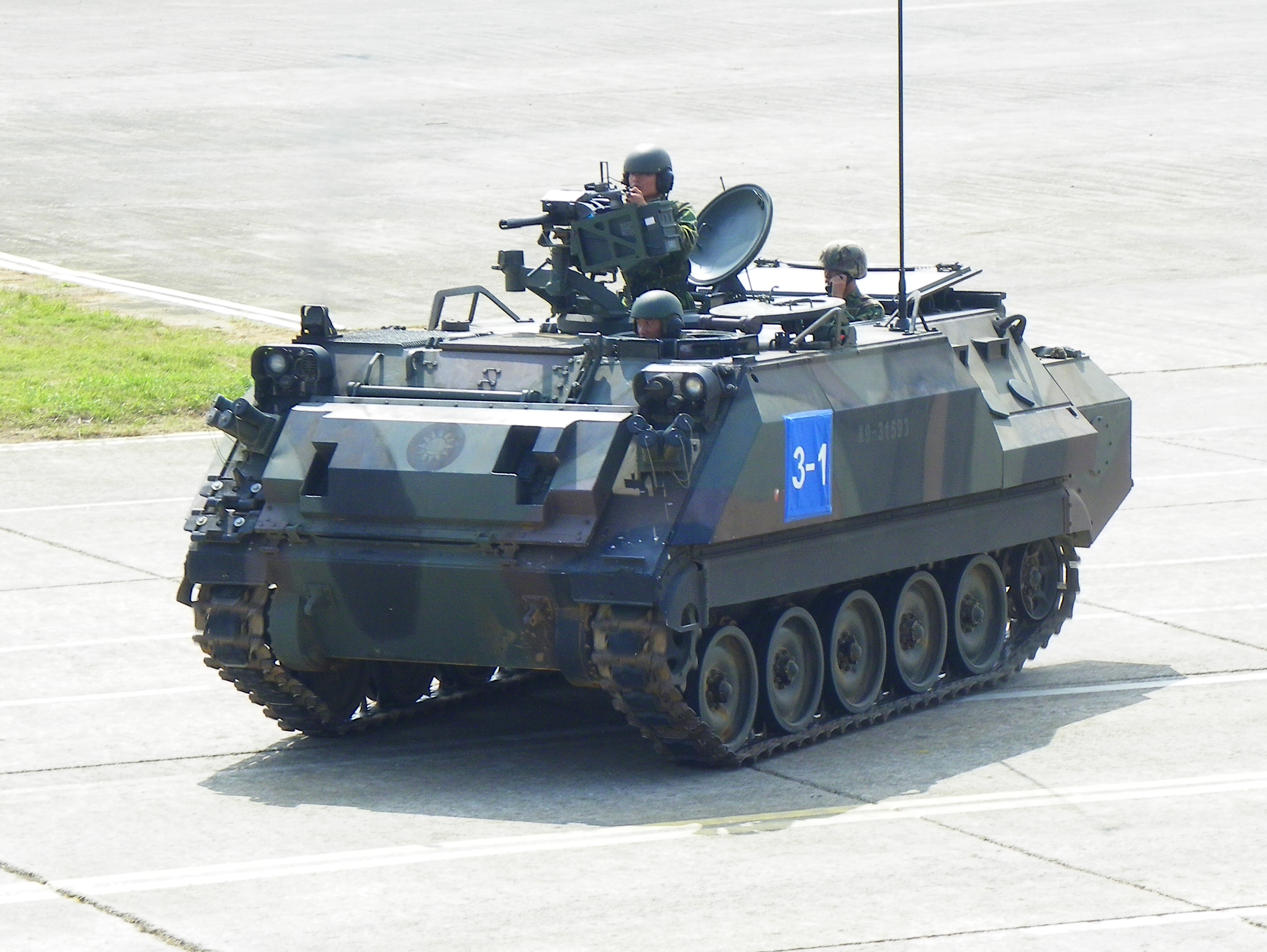 2011年陸軍湖口營區開放活動，中興臺大校場地空整體作戰攻擊演練中，左翼一輛CM-21A1通過觀眾席前向東推進。